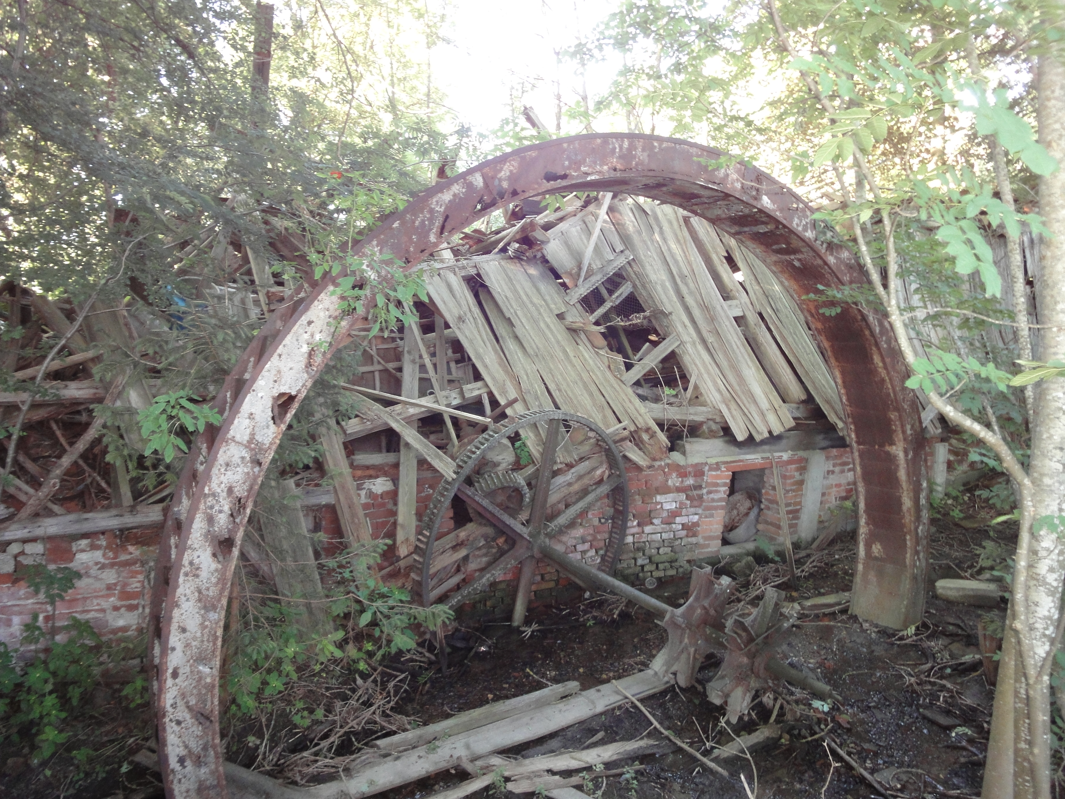 ehemalige Sägmühle in Horgau, verbretterter Ständerbau, 19. Jahrhundert